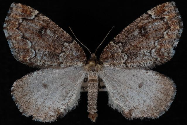 Epirranthis substriataria